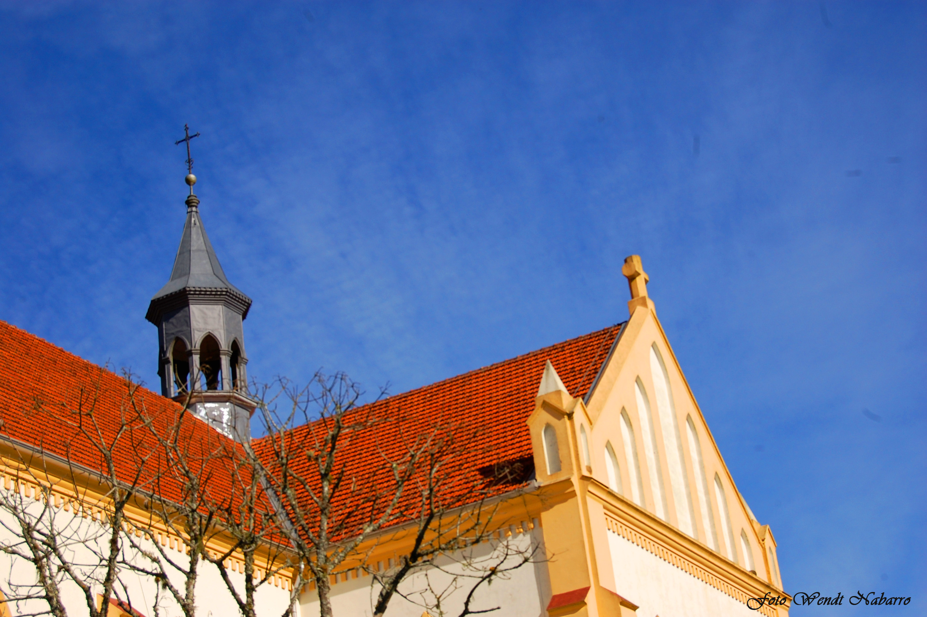 Igreja de Santo Estanislau em Paraguaçu, Itaiópolis, Santa Catarina, Brasil